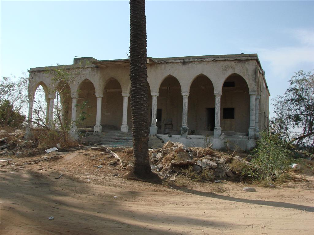 כפר קוביבה - כפר גבירול - רחובות